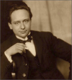 Viktor Ullmann (1898-1944), österreichischer Komponist